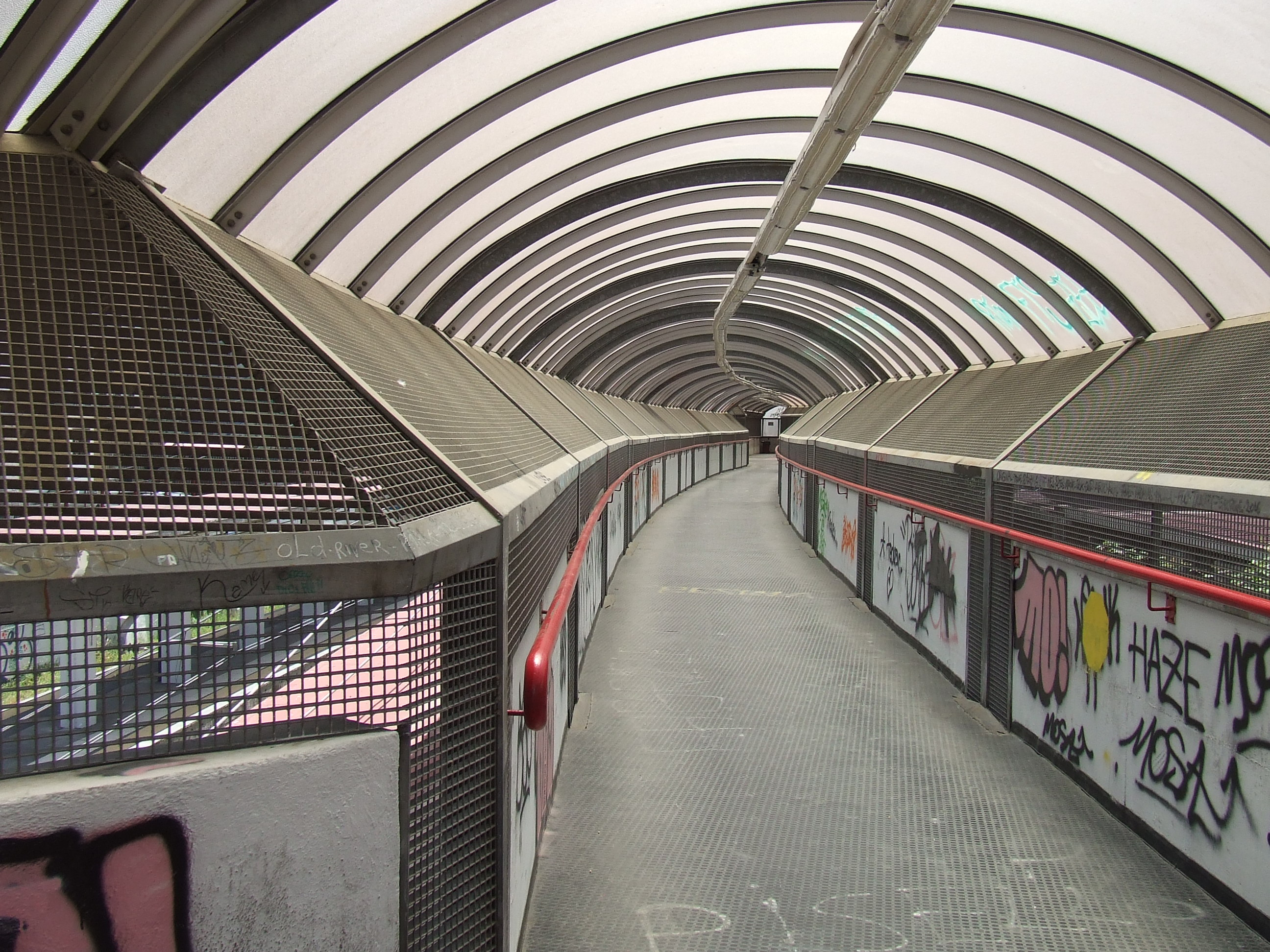 Stazione di San Giorgio a Cremano, Circumvesuviana, EAV - corridoio sospeso di collegamento tra i binari della linea Napoli - Pompei - Poggiomarino e quelli della linea Botteghelle - San Giorgio a Cremano